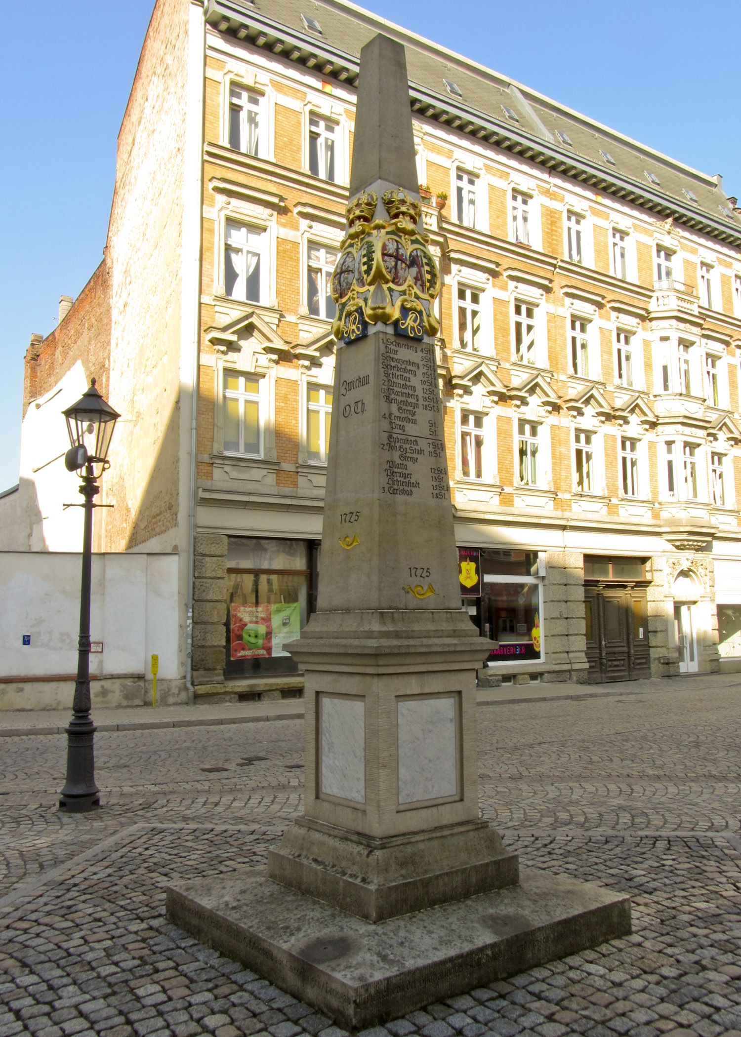 Kursächsische Postmeilensäule-Distanzsäule in Zwickau